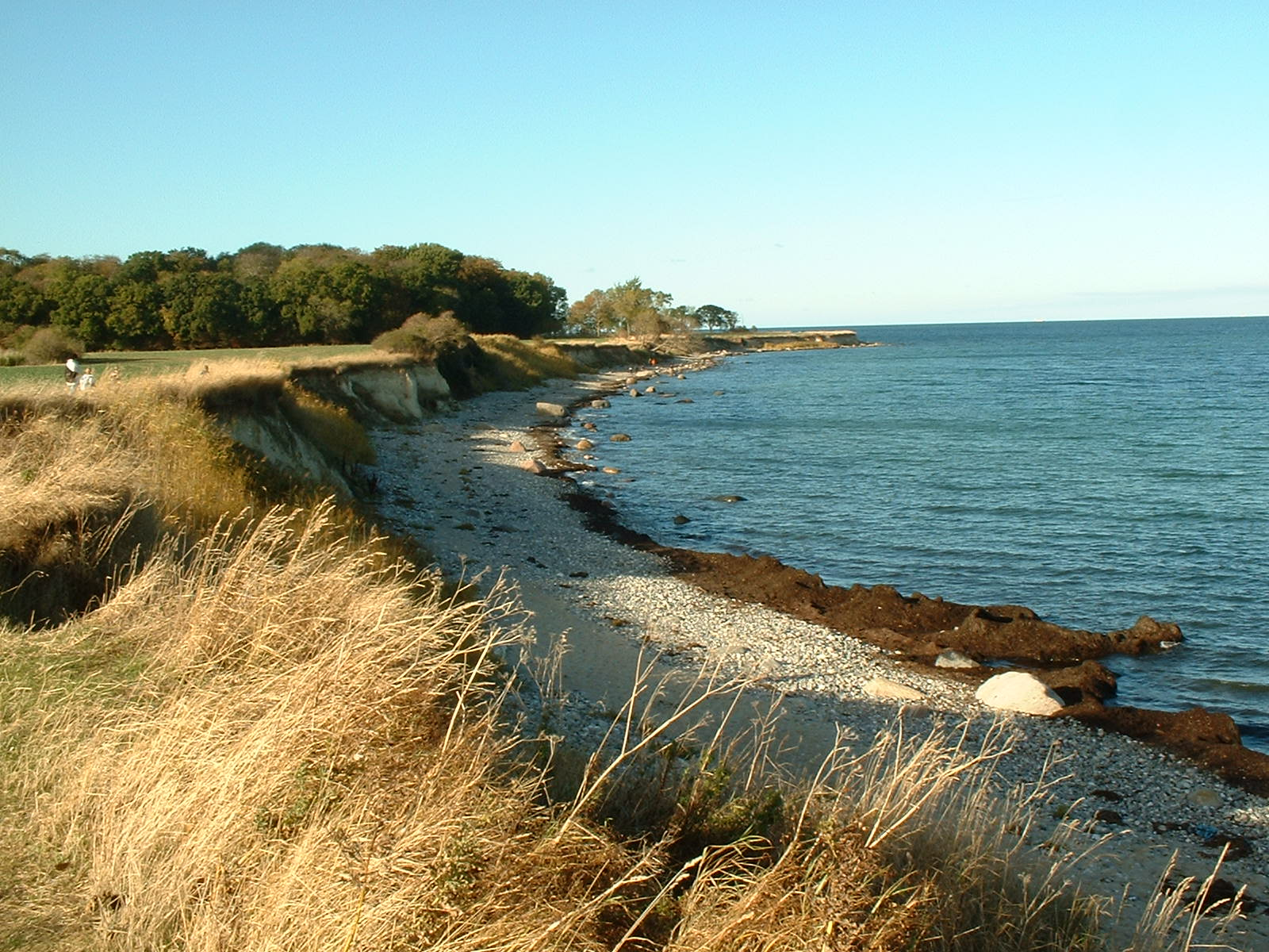 Strandküste am südlichsten Teil der Insel Fehmarn